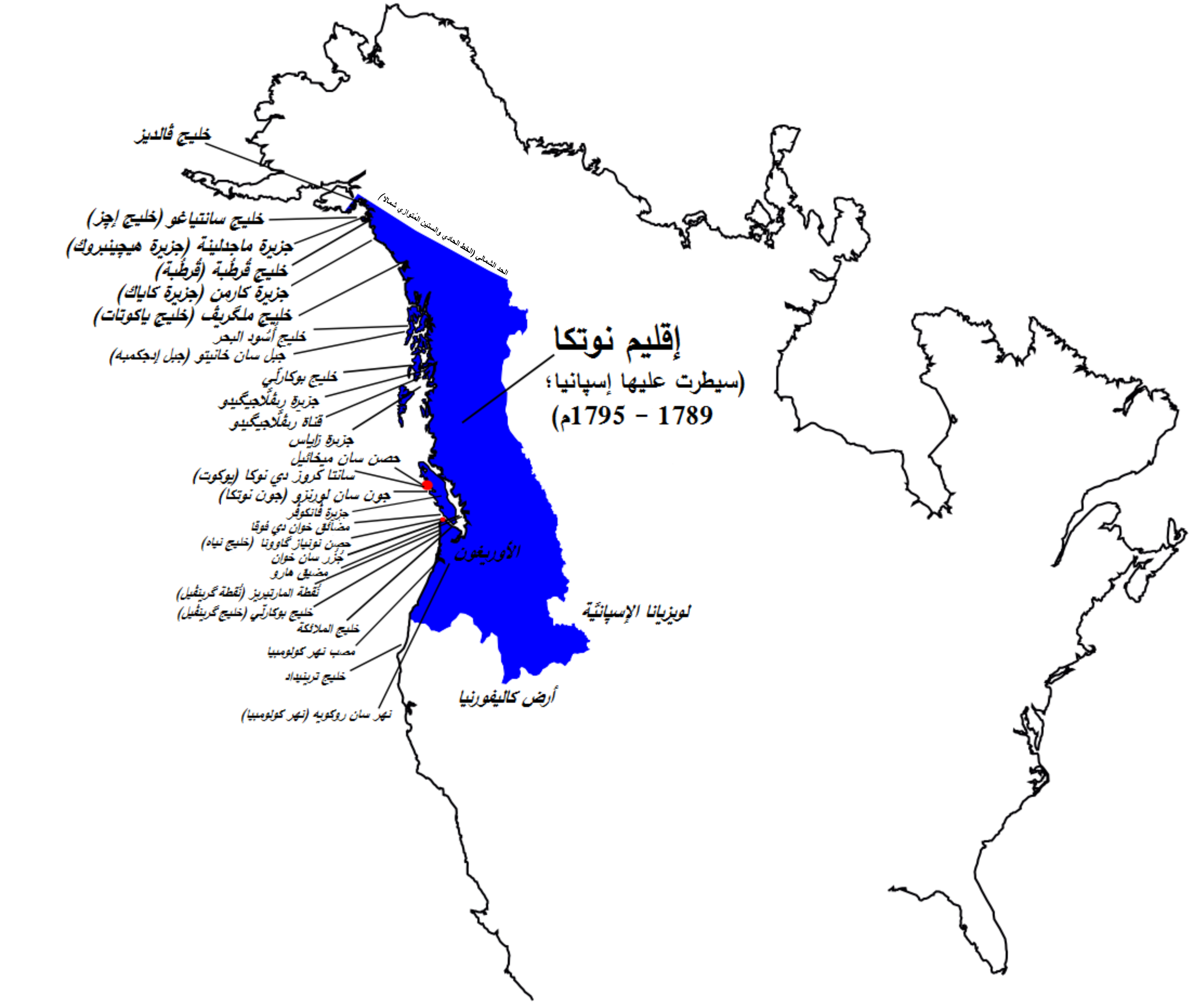 المناطق والأقاليم التي ظفرت بها إسپانيا في الساحل الغربي لِأمريكا الشماليَّة، خِلال القرن الثامن عشر.